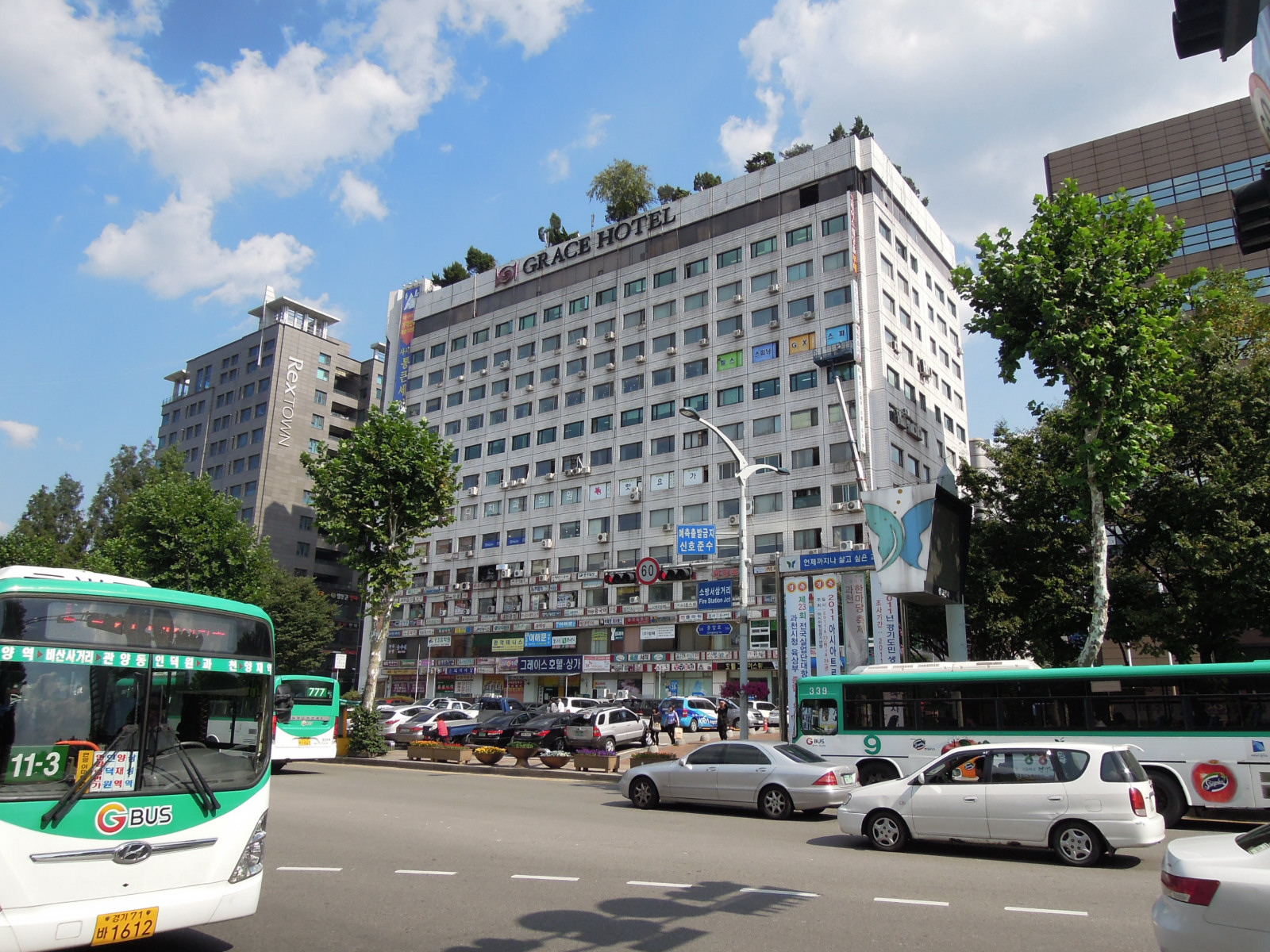 Gwacheon, Grace-HotelDansk: Gwacheon, Grace-Hotel